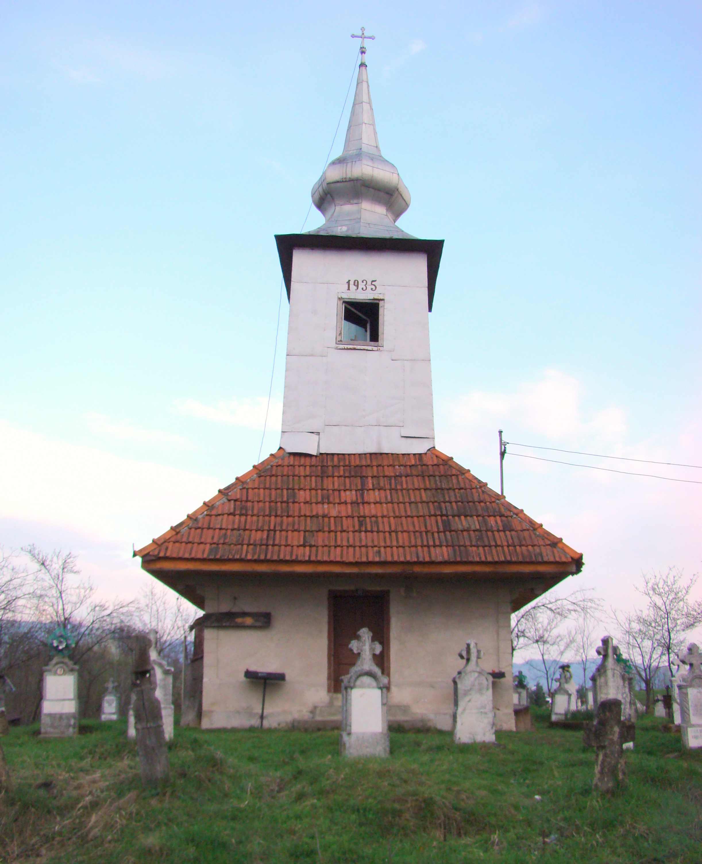 Biserica de lemn „Schimbarea la Faţă” din Dumbrăvani, Bihor